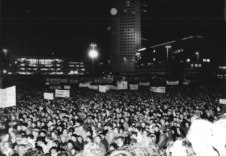 Leipzig, Montagsdemonstration ADN-ZB Gahlbeck 27.11.89 Leipzig: Demonstration- Nach Friedensgebeten in sieben Kirchen fanden sich etwa 200.000 zur traditionellen Montags-Demonstration ein. Auf dem Meeting vor dem Opernhaus artikulierten Mitglieder von Parteien, Massenorganisationen, Initiativgruppen und andere ihren Willen, im Land zu bleiben und für demokratische Veränderungen einzutreten.